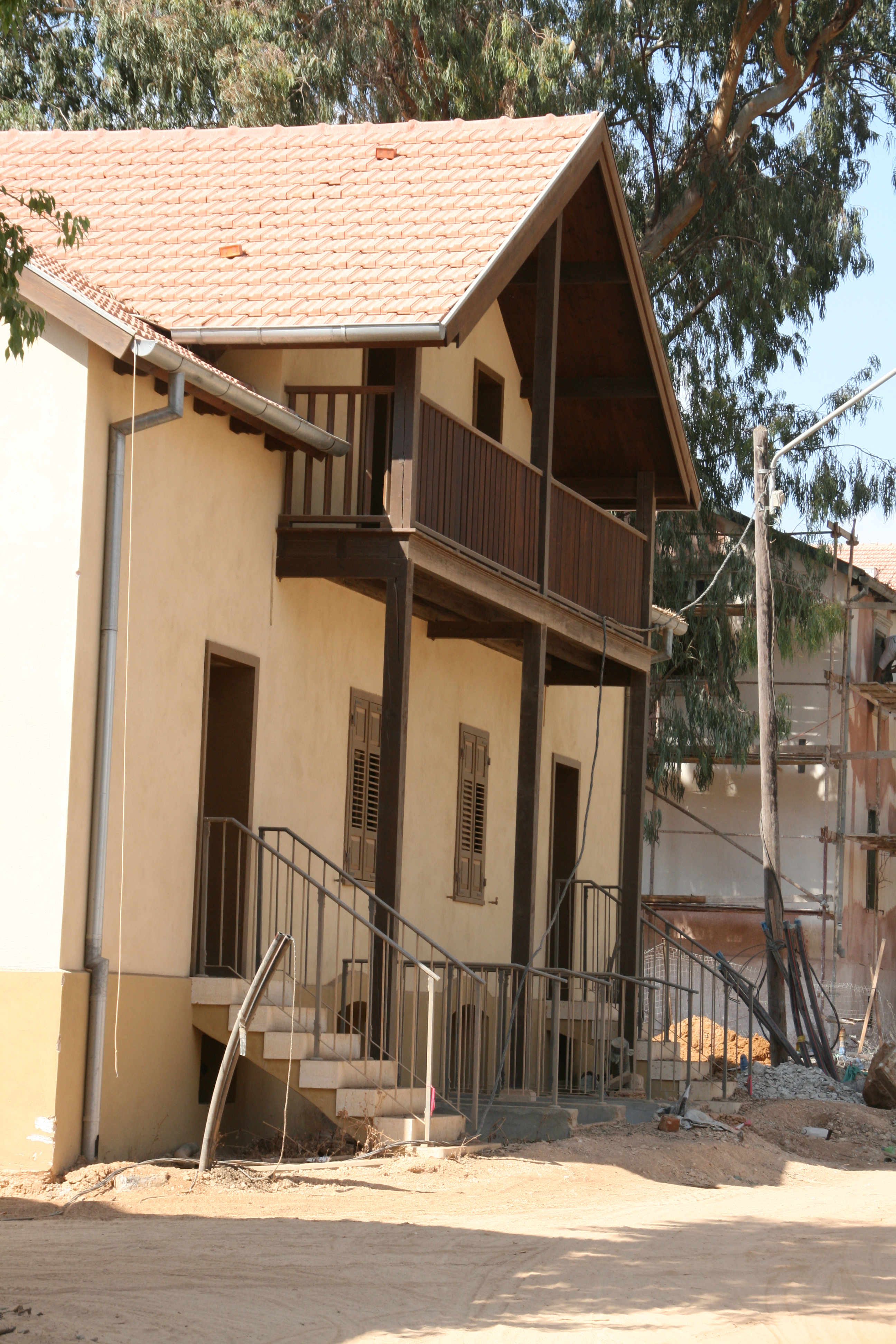 שׂרונה היא המושבה הרביעית שהקימו הגרמנים הטמפלרים בארץ ישראל במחצית השנייה של המאה ה-19. המושבה הוקמה ארבעה קילומטרים צפונית ליפו, ואחרוני בתיה שוכנים כיום בתל אביב בין שדרות שאול המלך מצפון, דרך בגין במזרח, רחוב הארבעה מדרום, ומגרשי החנייה של אחוזות החוף ממערב. מקצתם נמצאים היום בתוך בסיס הקריה.